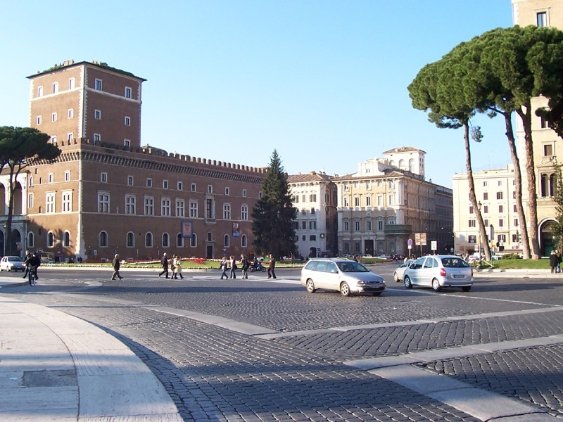 Roma - Piazza Venezia